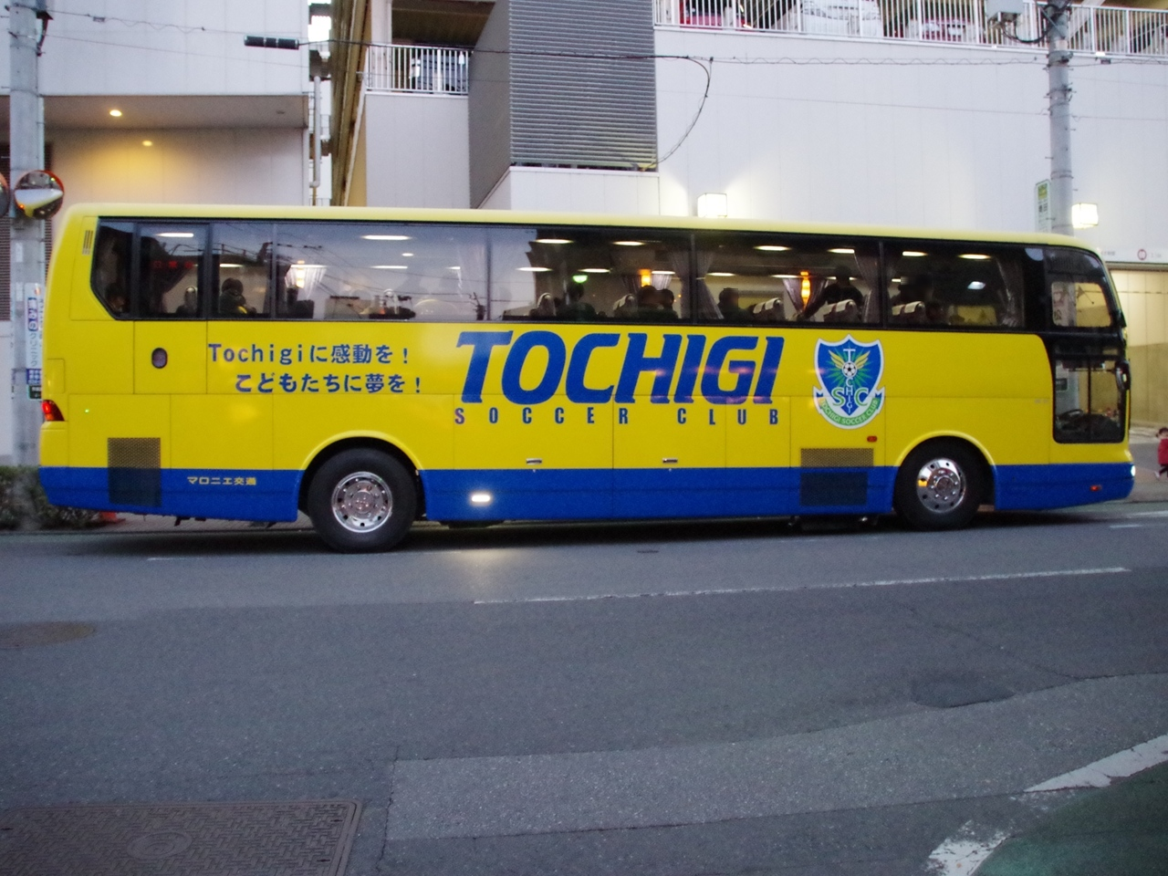 マロニエ交通が保有する栃木ＳＣのチームバス